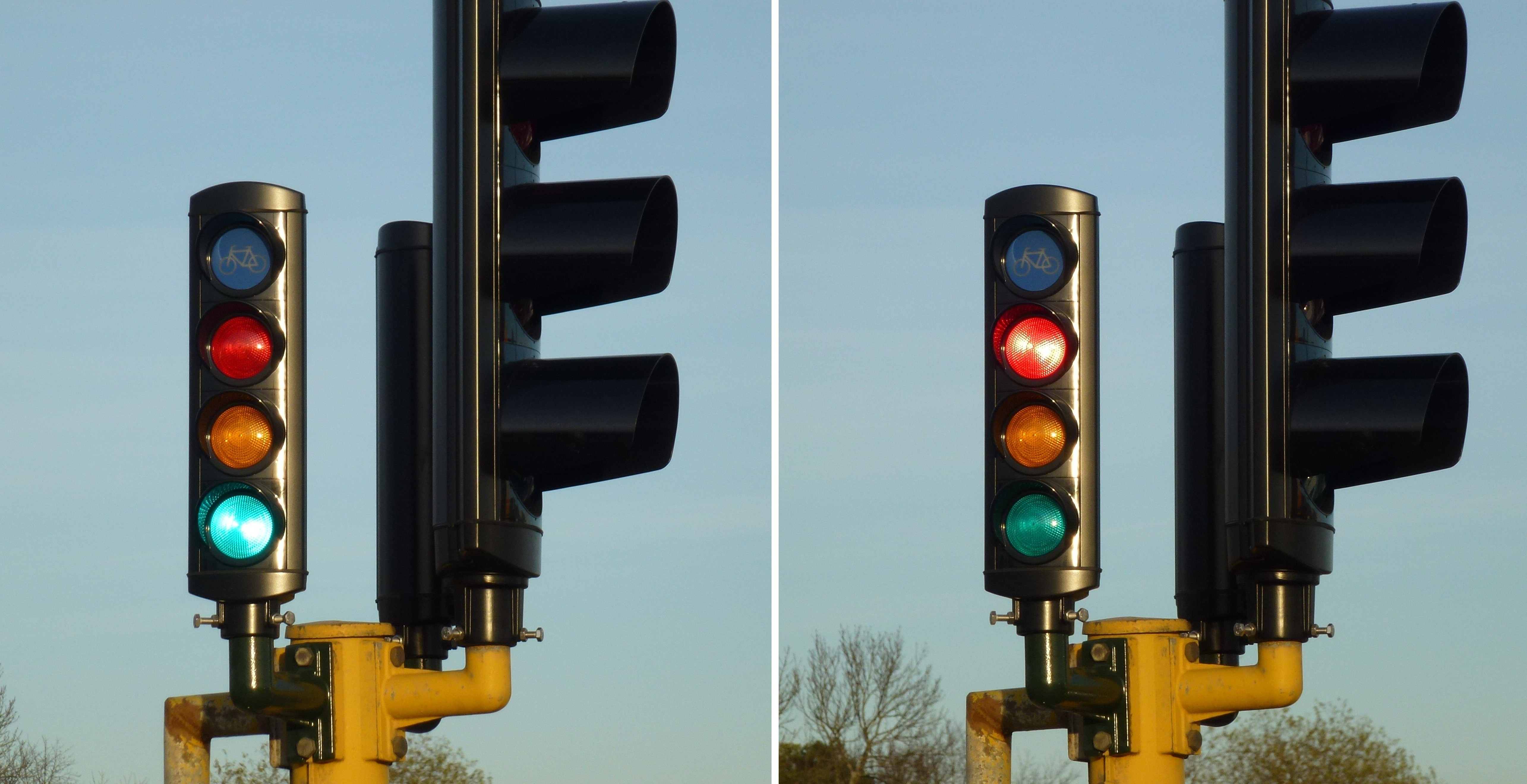 Trafiksignal cylel gönt rött